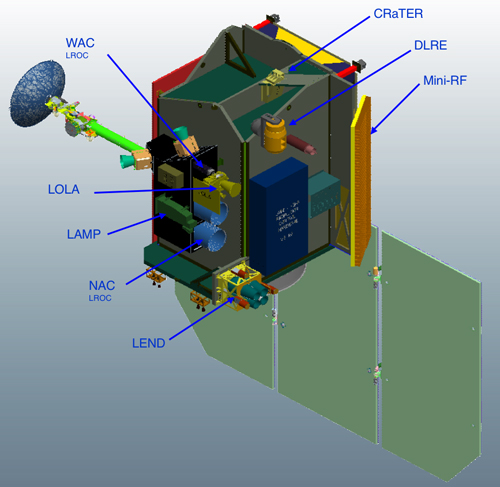 Lunar Reconnaissance Orbiter payload